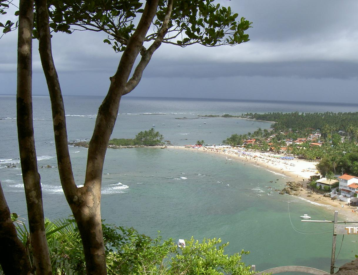 Morro de Sao Paulo, Bahia, Brazil